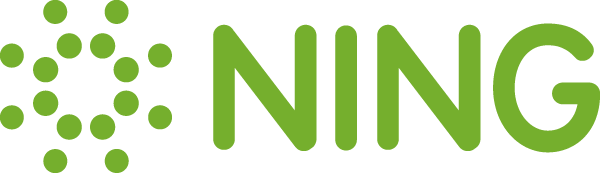 Logo von Ning, Inc.